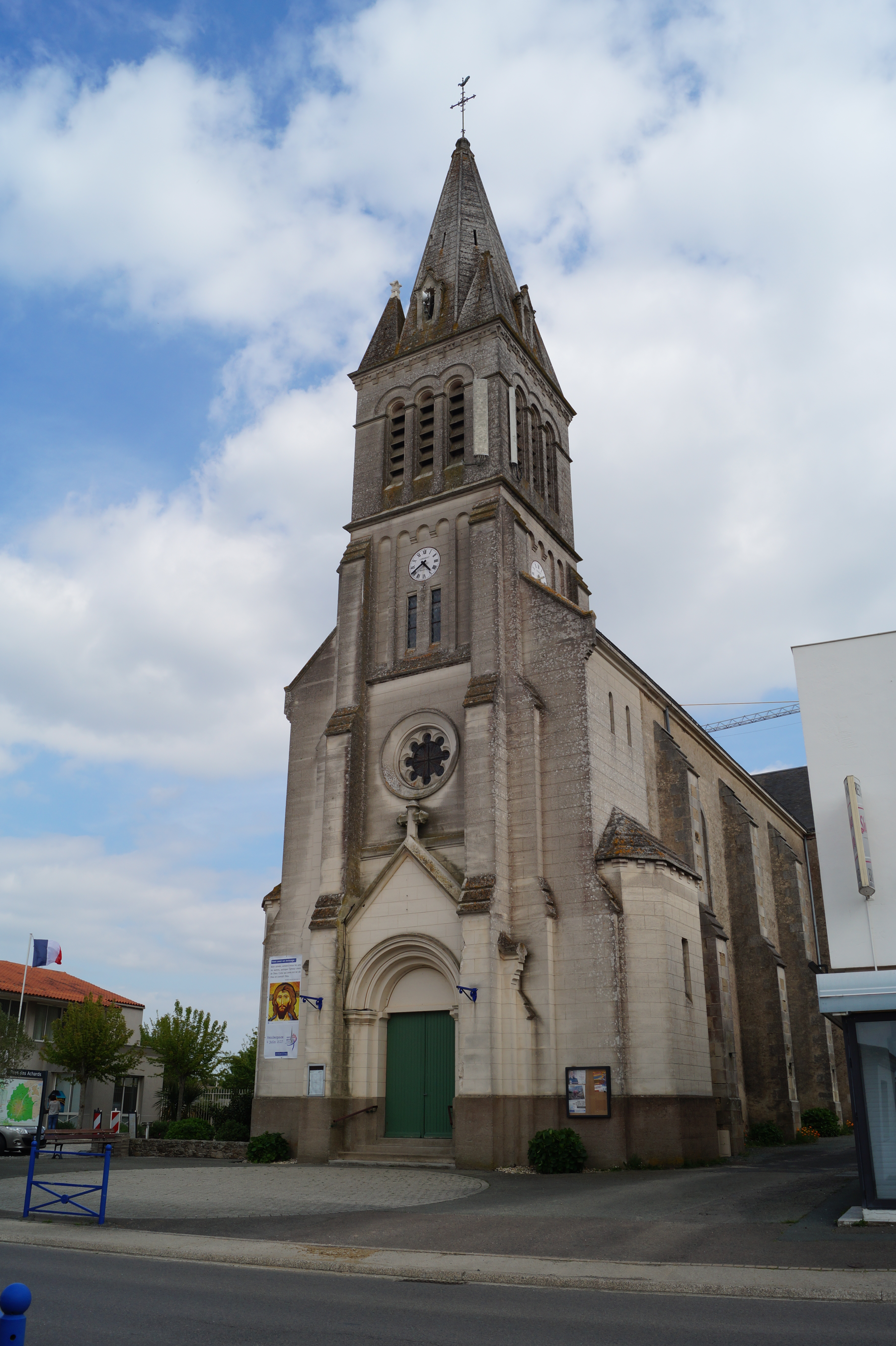 L’église Saint-Mathurin de Saint-Mathurin.